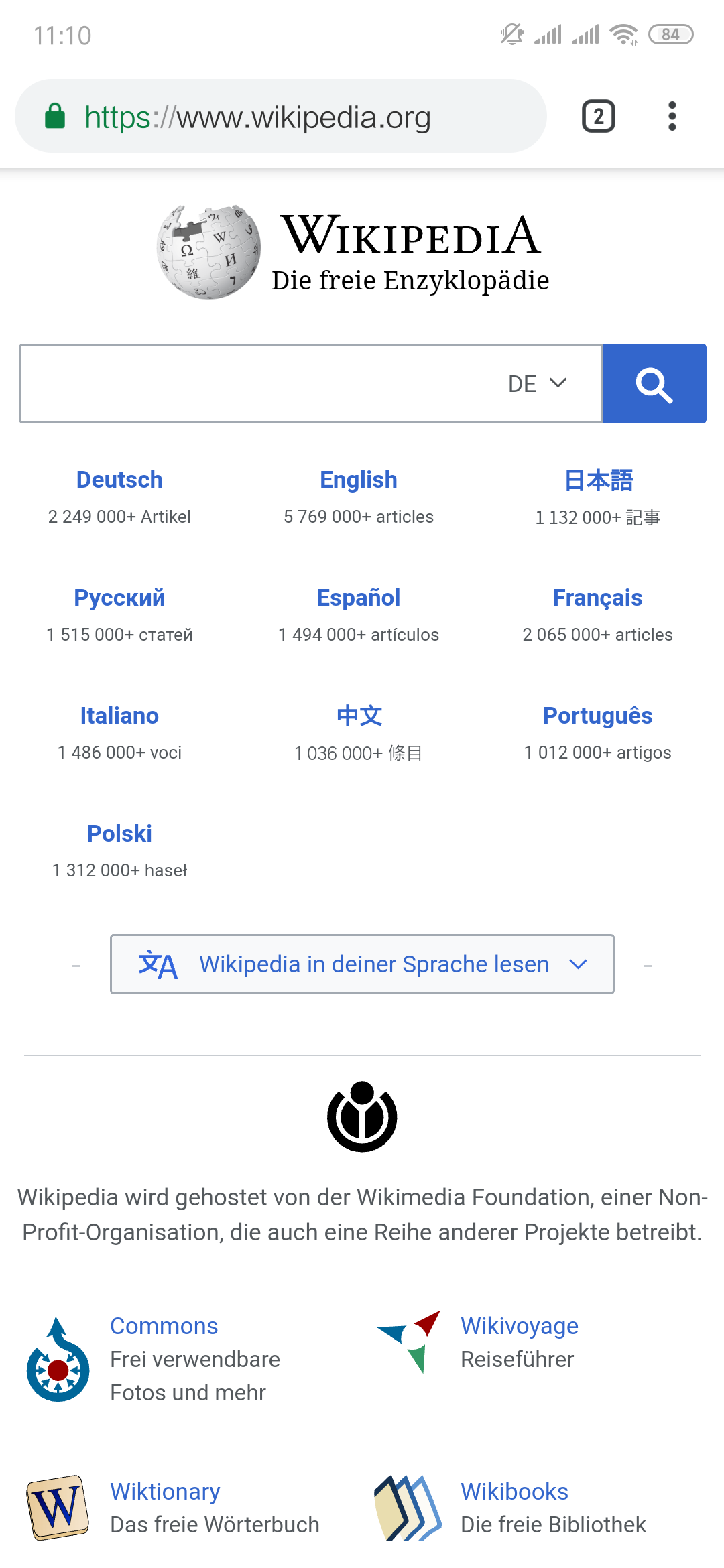 Ein Screenshot der mobilen Startseite von Wikipedia, der freien Enzyklopädie